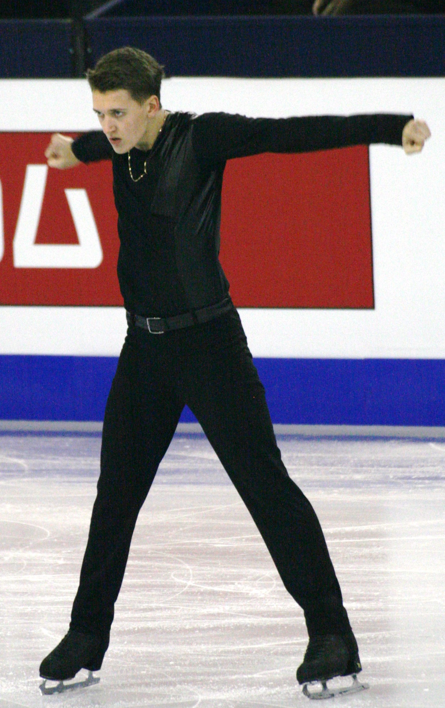 Максим Ковтун (Россия) на финале Гран-при по фигурному катанию 2014-2015.